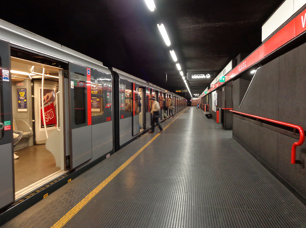 Stazione di Villa San Giovanni della metropolitana di Milano.